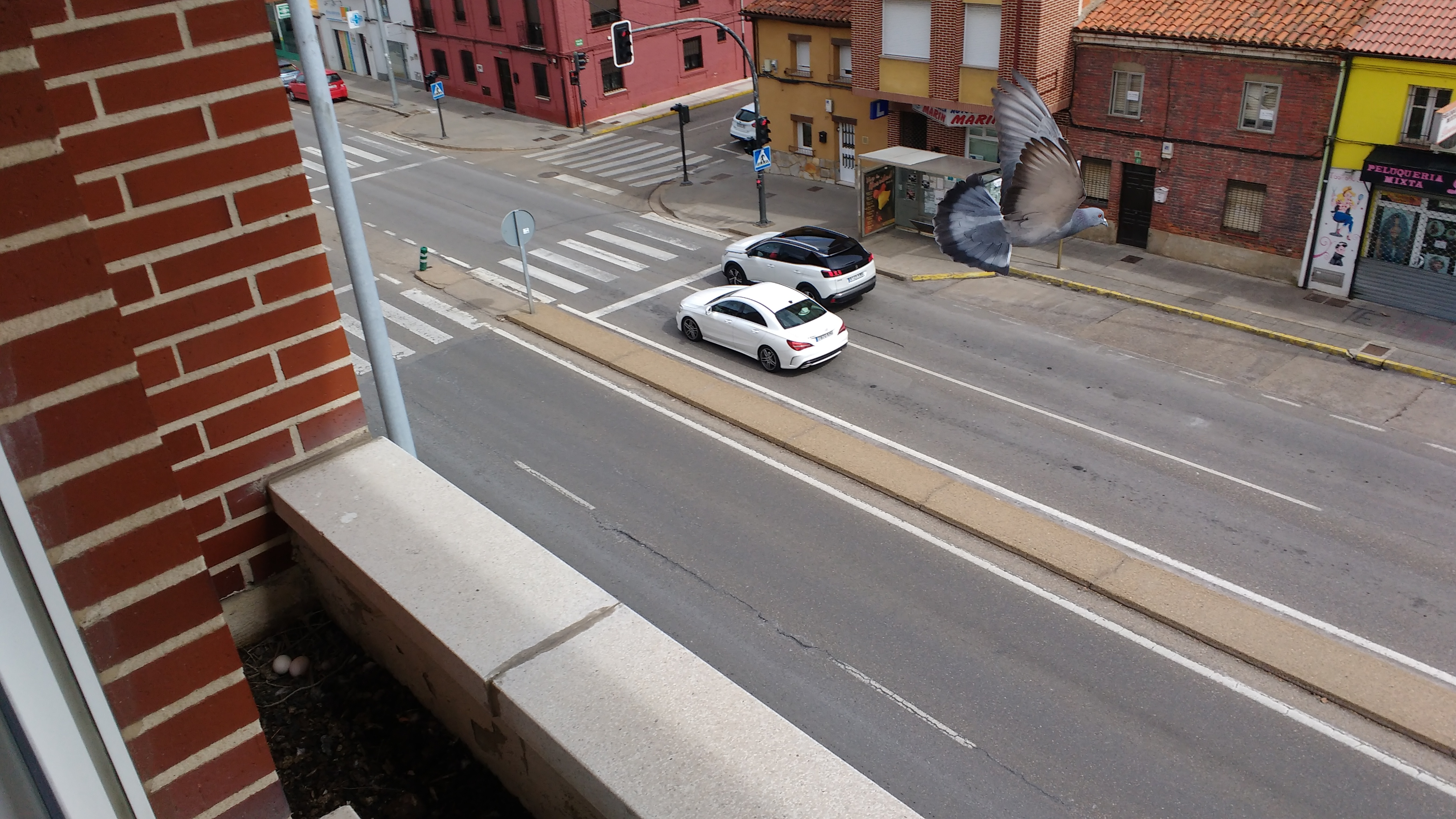 Columba livia domestica (paloma doméstica), volando desde su nido en el que deja un par de huevos, en La Virgen del Camino (municipio de Valverde de la Virgen, León, España).